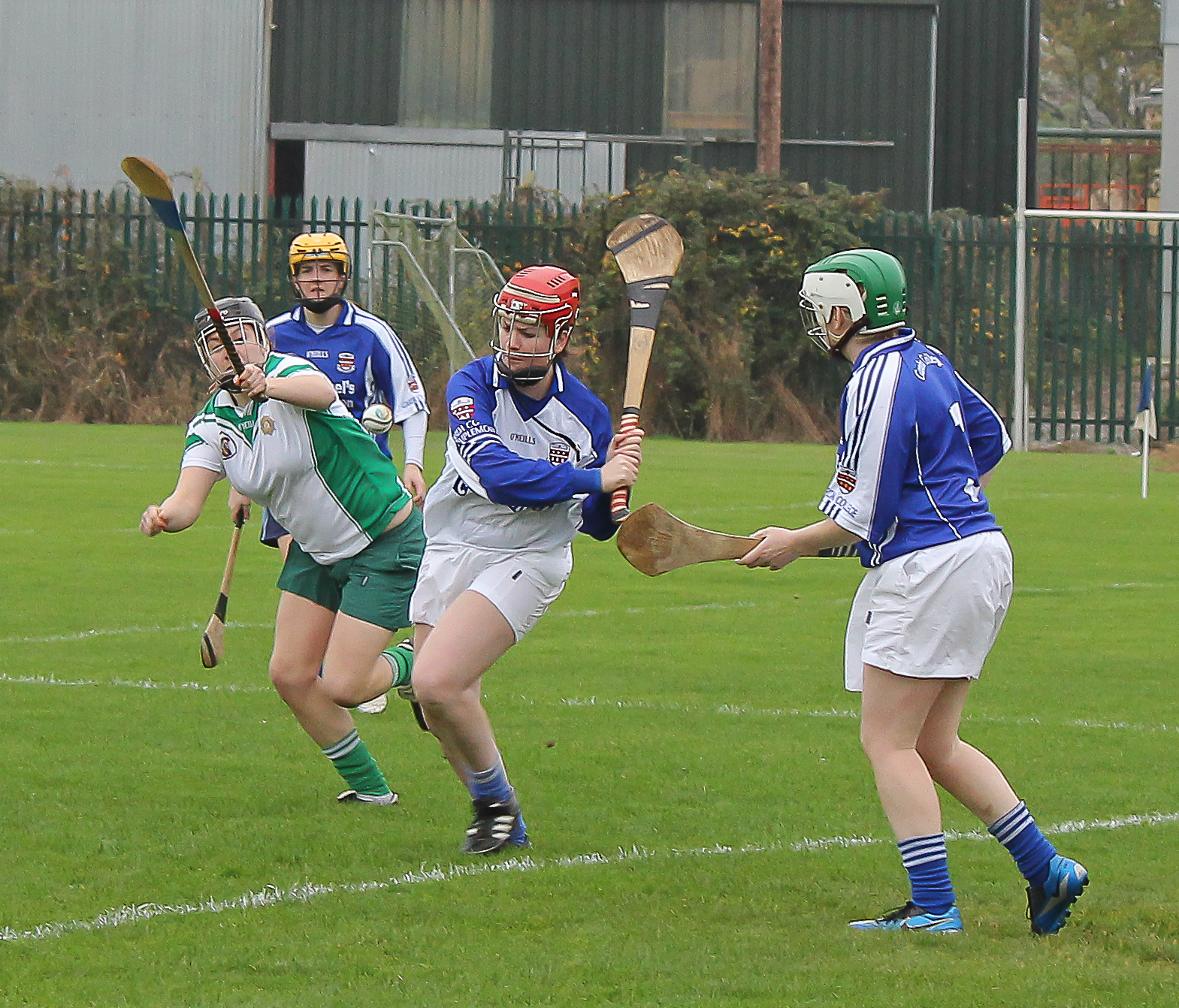 Camogie Game 24/10/12